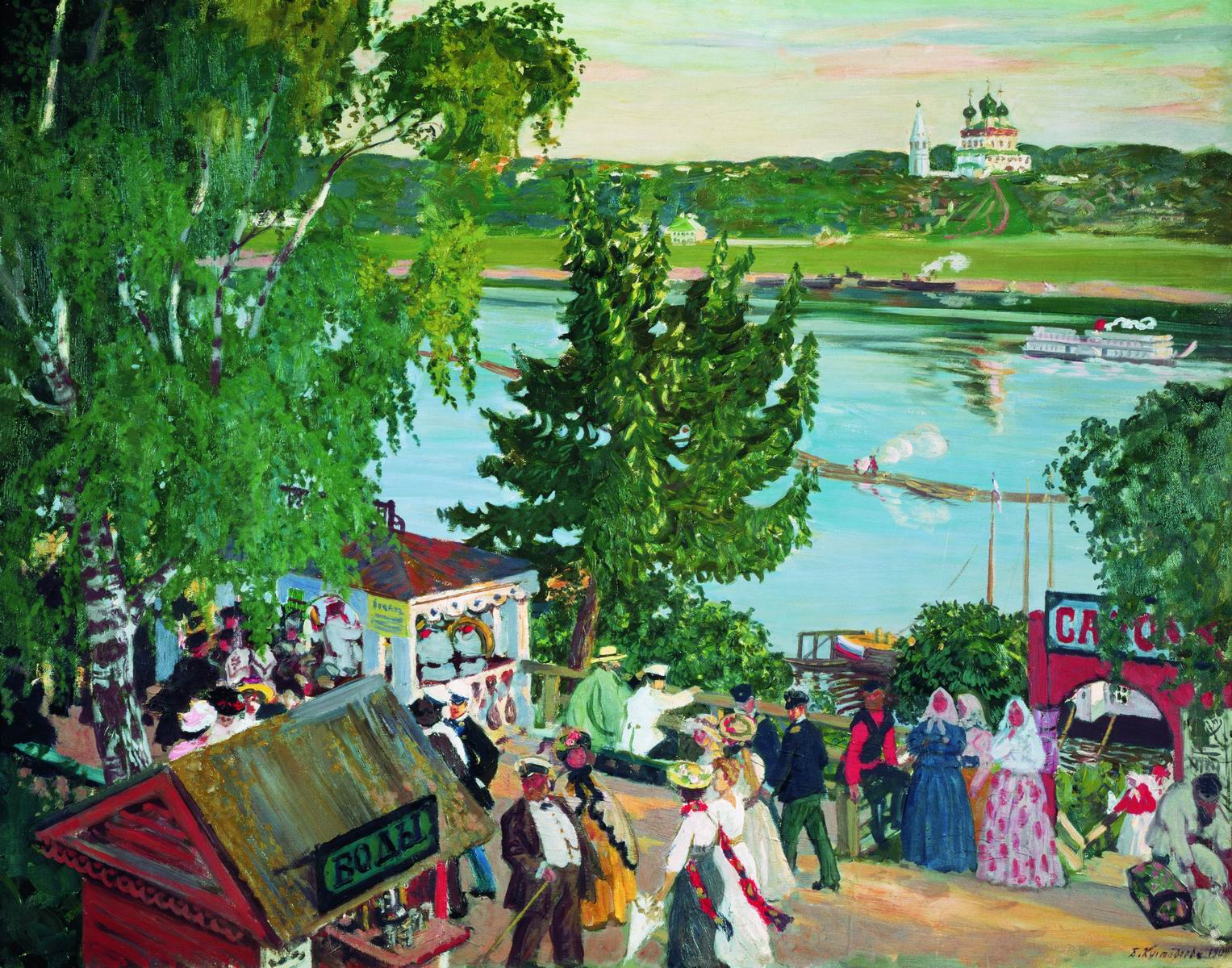 Изображена романовская сторона города Тутаева Ярославской области.